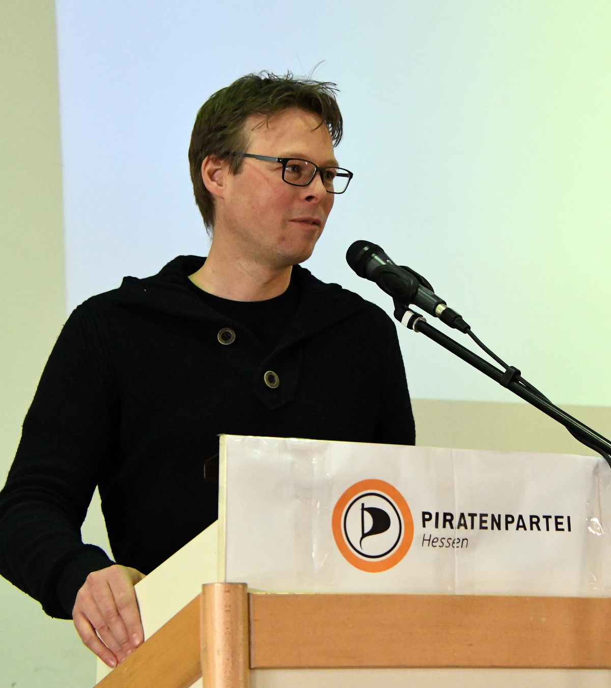 Sebastian Alscher als Spitzenkandidat für die Bundestagswahl 2017 der Piratenpartei Hessen bei der Aufstellungsversammlung der Landesliste für den Bundestag der Piratenpartei Hessen am 22.01.2017 in Frankfurt